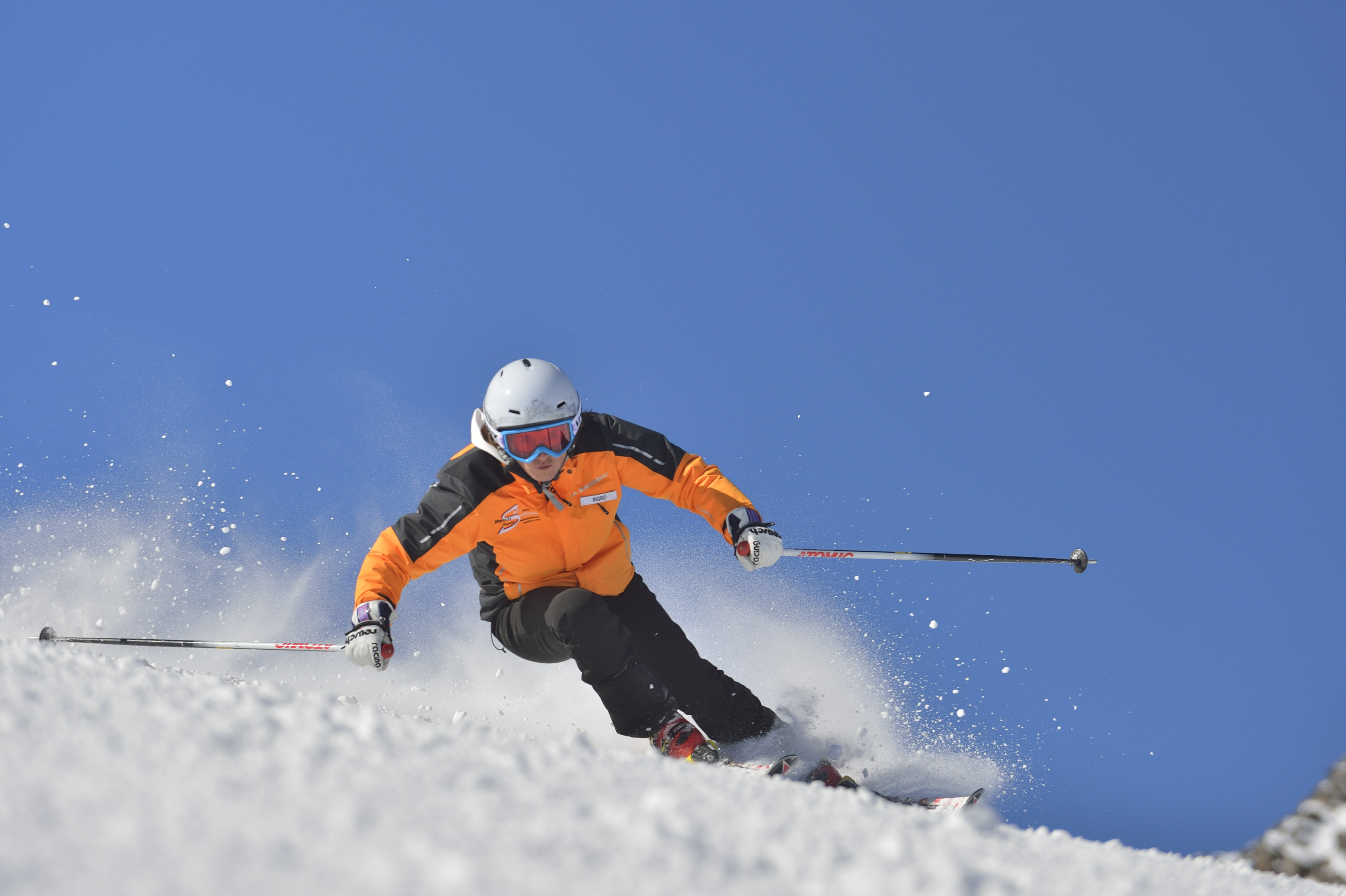 Die ehemalige Weltcup-Fahrerin Ingrid Salvenmoser beim Carven